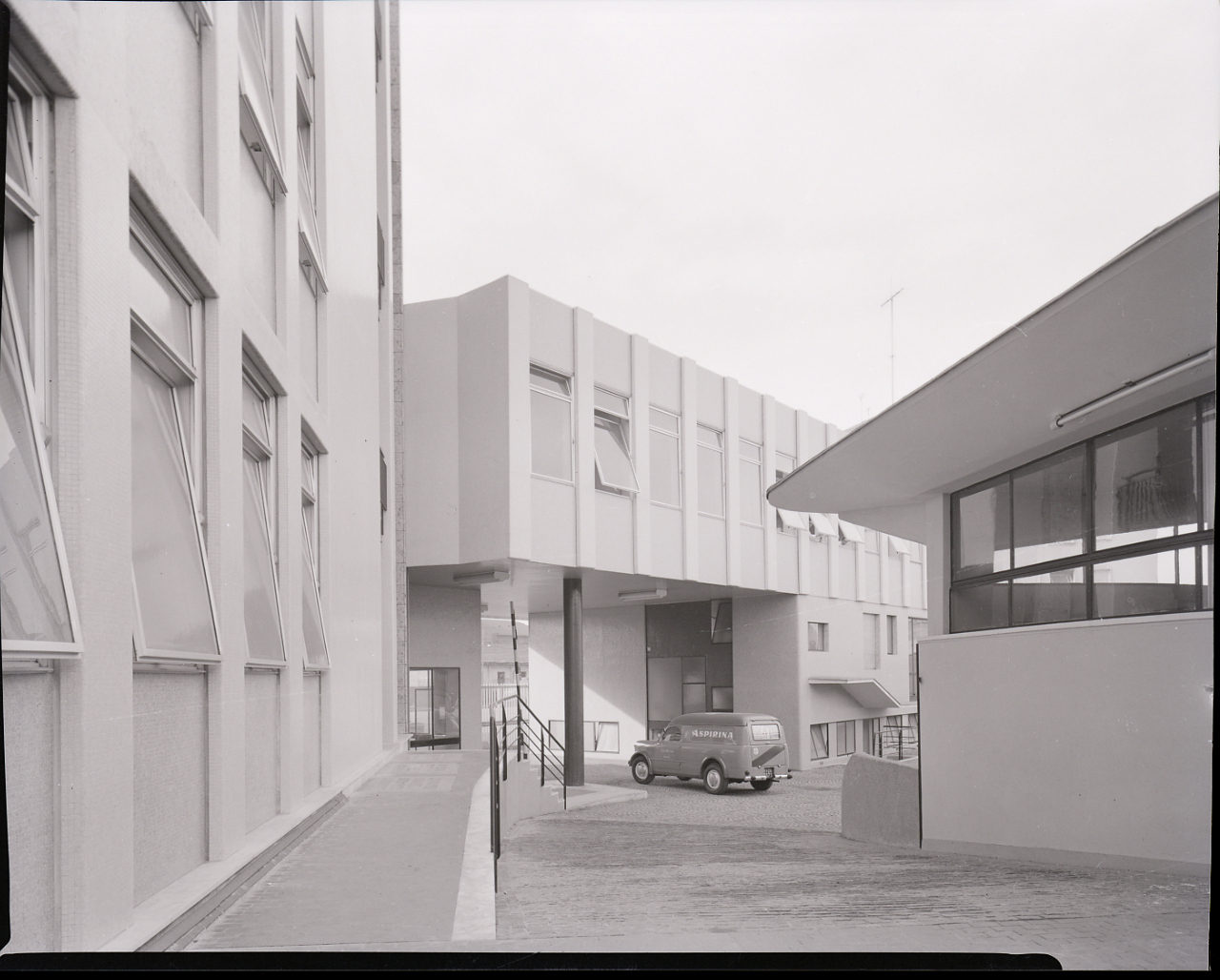 Milano, la sede della Bayer in viale Certosa 130 (angolo via Pier Francesco Mola). Servizio fotografico : Milano, 1965 / Paolo Monti. - Buste: 5, Fototipi: 8 : Negativo b/n, gelatina bromuro d'argento/ pellicola ; 10x12. - ((Serie costituita da 5 buste sciolte di negativi identificati con i nn.: 18957, 18958, 18959, 18960, 18961, 18962, 18965, 18970, 18971. - Le buste sono numerate da 60 a 68. - La suddetta serie è contenuta nella scatola G2429-2520, formato 18x24, e identificata con l'iscrizione didascalica manoscritta a pennarello nero: "Arch. De Luca - 2"